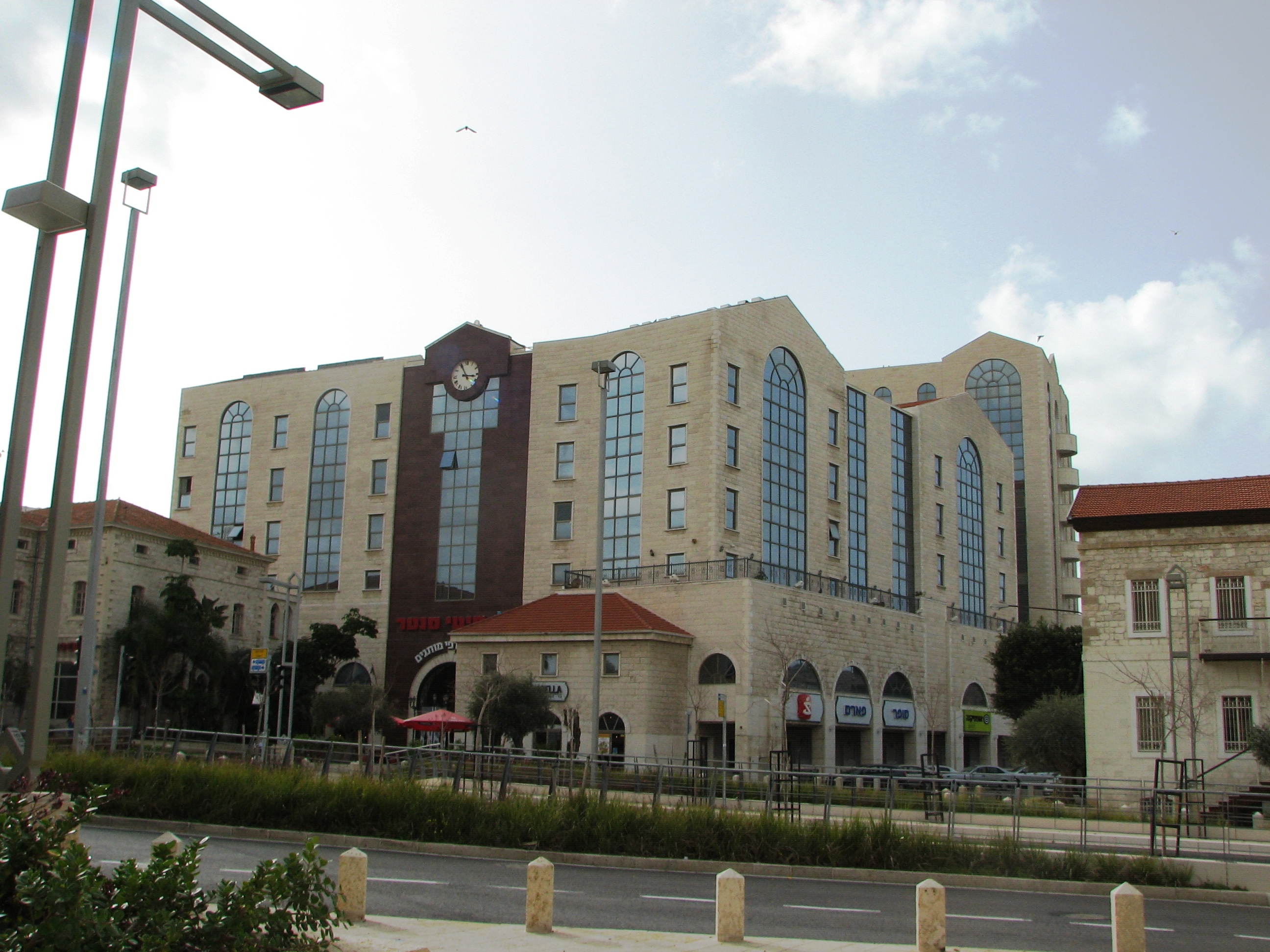 Jaffa St. Haifa Israel מראות בדרך יפו בעיר התחתית בחיפה. דרך יפו היא דרך היסטורית שתחילתה בימי דאהר אל-עומר שהקים ב-1761 את "חיפה החדשה" מרכז מסחרי שנבנה במושבה הגרמנית בשנת 1990 בסגנון המזכיר אדריכלות טמפלרית.